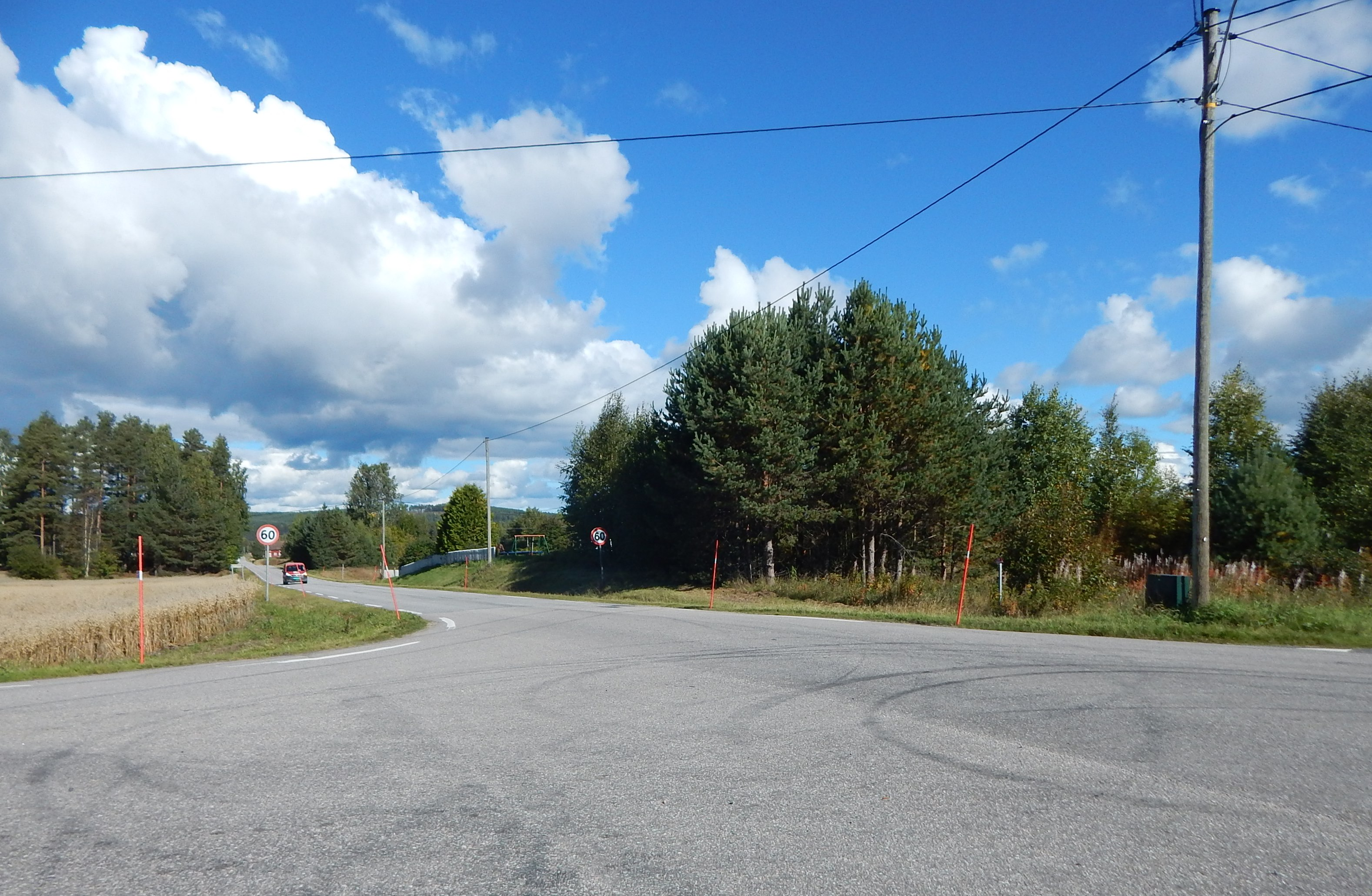 Smørbølsmoen (fylkesvei 453) nordover fra krysset med Vestre Gjesåsveg